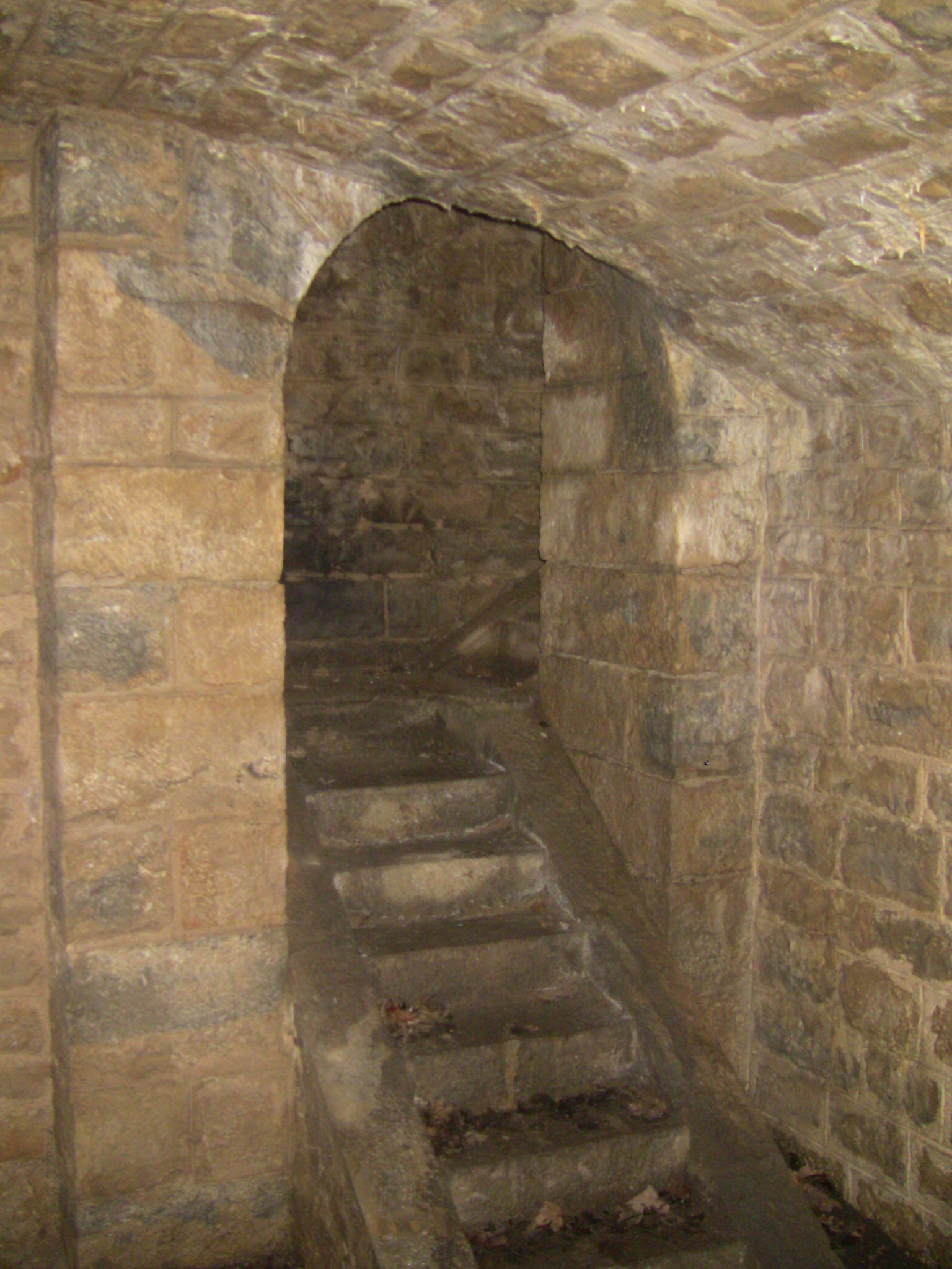 Rampe de la chambre II de la batterie de mortiers du fort de Planoise, à Besançon (Doubs, France).